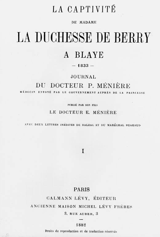 Prosper Ménière: La Captivité de Madame La Duchesse de Berry à Blaye. Paris, Ancienne Maison Michel Lévy Frères, 1882.